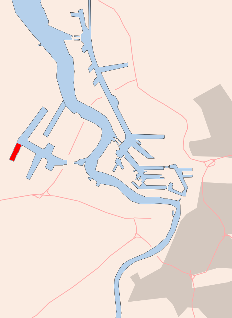 Antwerp , Verrebroekdok